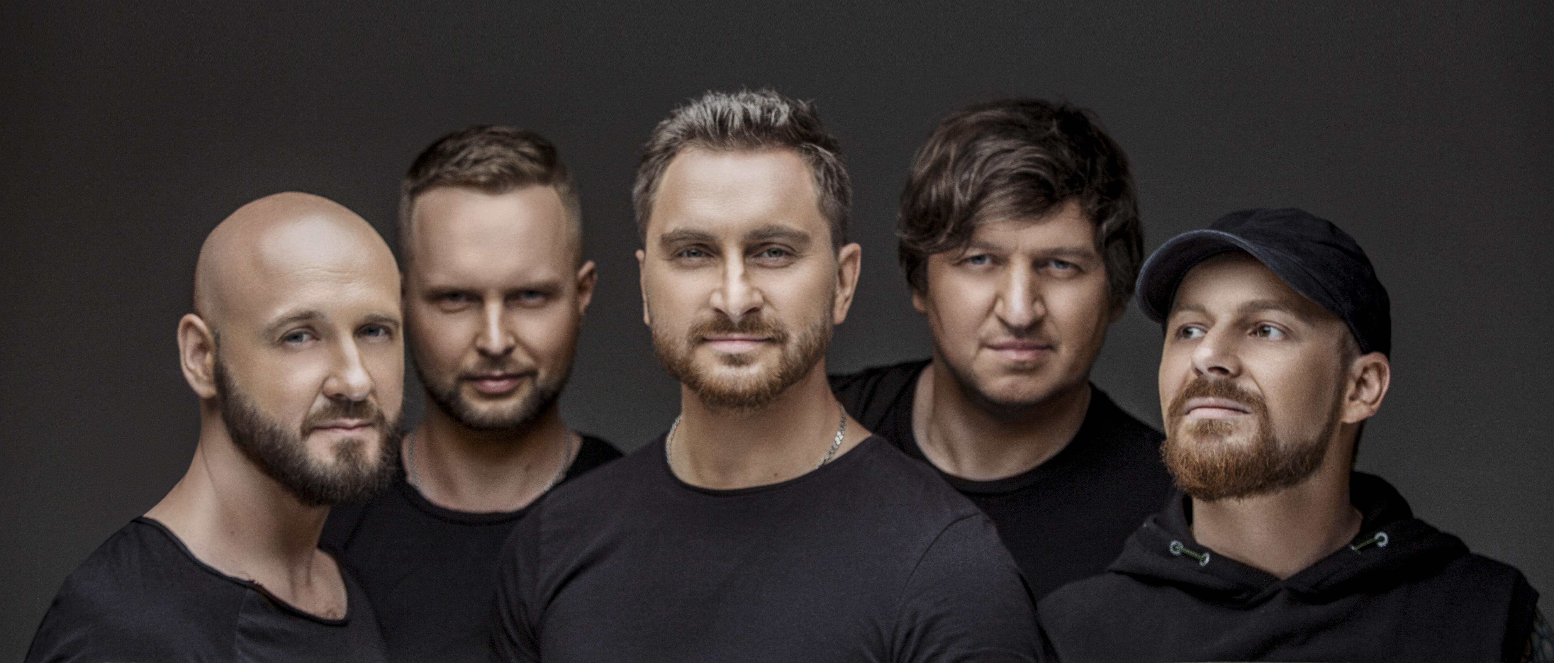 Фото гурту СКАЙ станом на 2016 рік. Склад гурту (зліва направо): Олександр Грищук, Євгеній Кібелєв, Олег Собчук, Юрій Мозіль, Олександр Друкер.